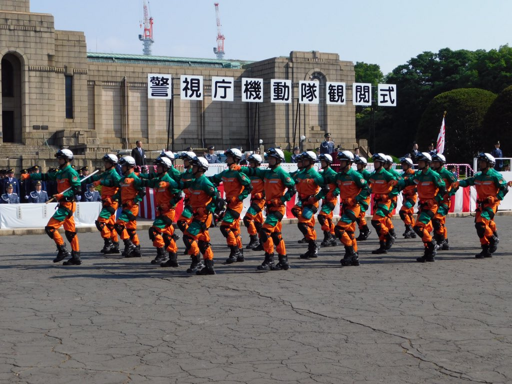 警視庁警備部の特殊救助隊（SRT）。2017年機動隊観閲式で撮影。